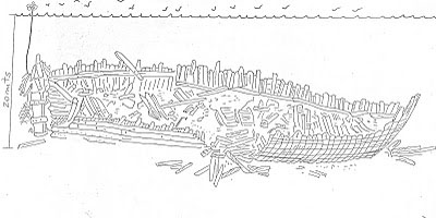 Representación del estado de la goleta Covadonga en 1987